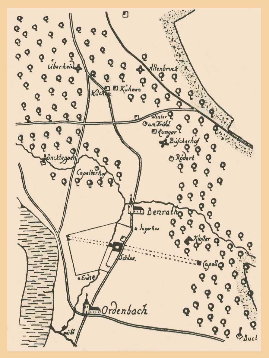 Düsseldorf-Benrath in 1751